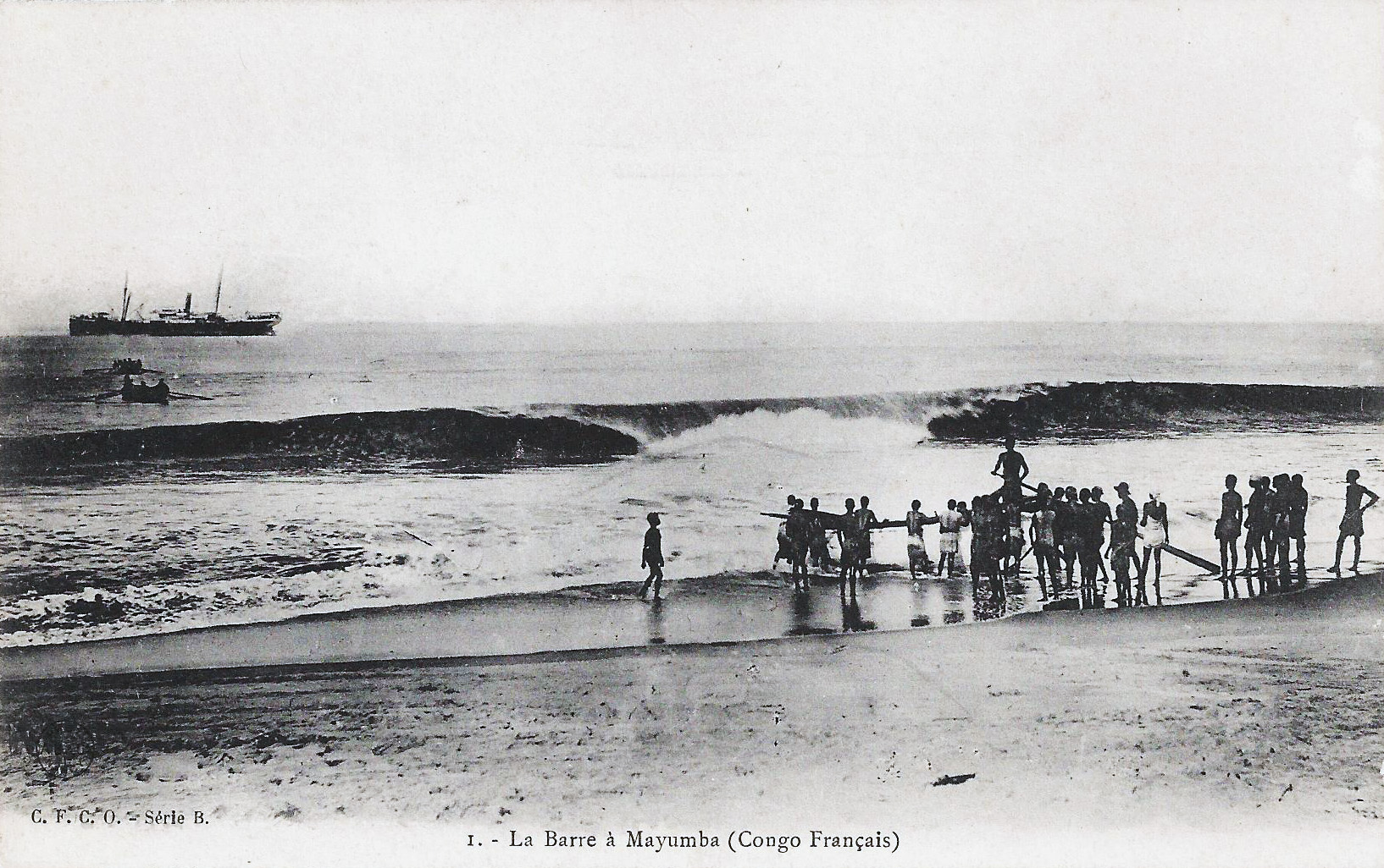 La barre à Mayumba. Congo Français. Phot. A.B. & Cie, Nancy [Albert Bergeret] C.F.C.O., série B